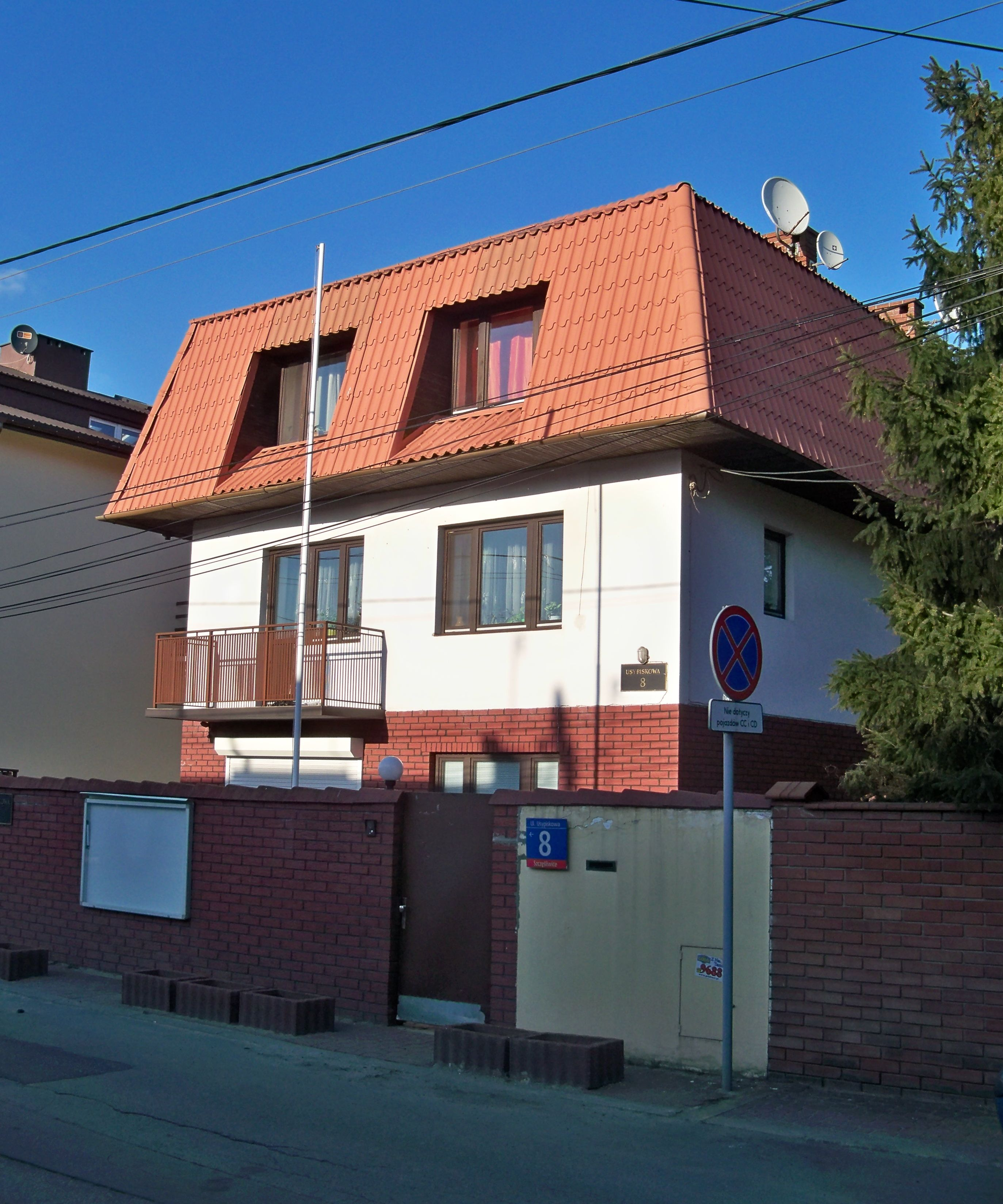 Warszawa, ul. Usypiskowa 8. Była siedziba ambasady Laosu w Polsce.